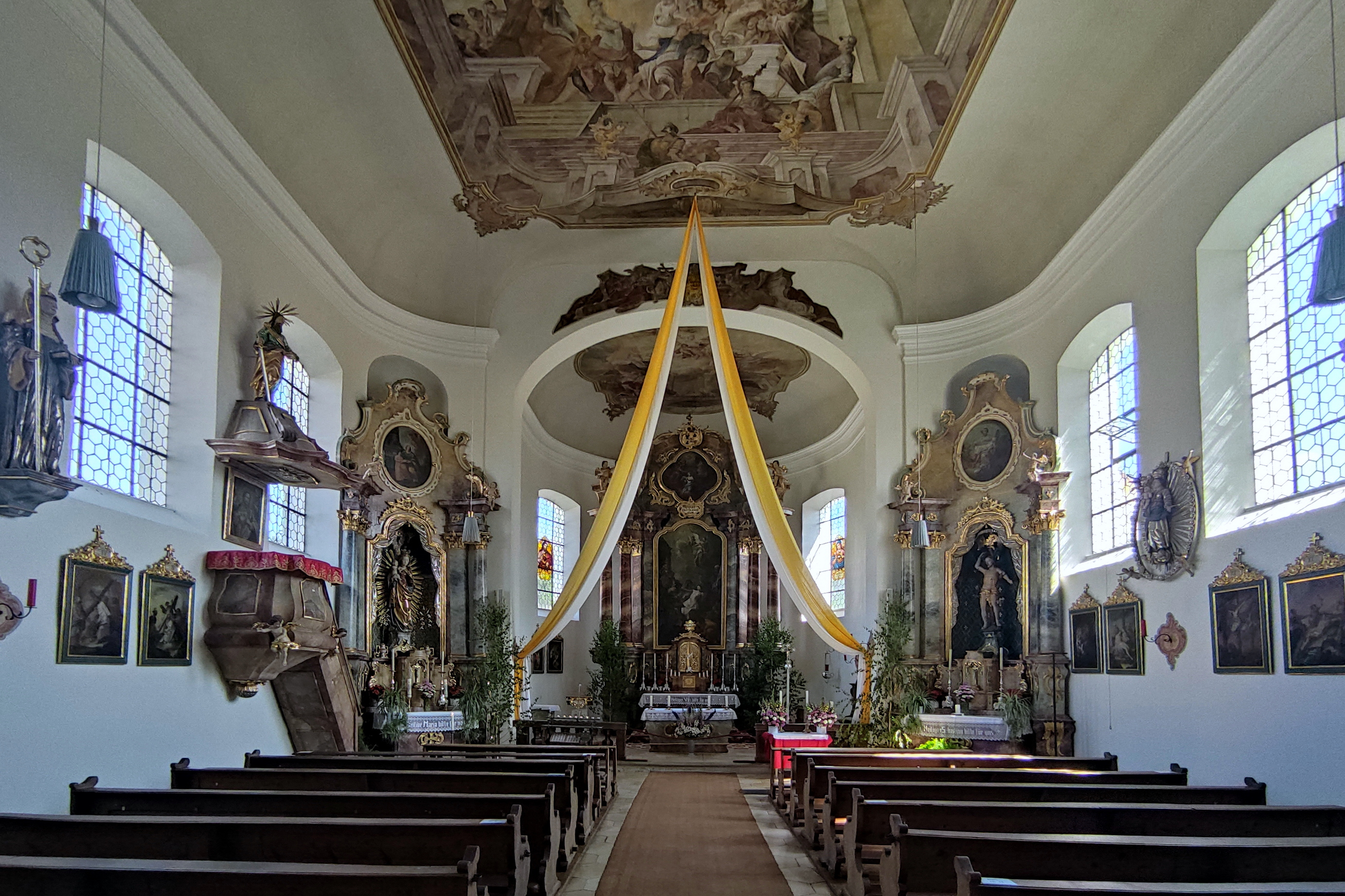 Die stattliche Wehrkirche (Wehrkirche Kottingwörth) mit ihrer Doppelturmfassade wurde 1760 durch den Eichstätter domkapitelschen Maurermeister Dominikus Barbieri errichtet.